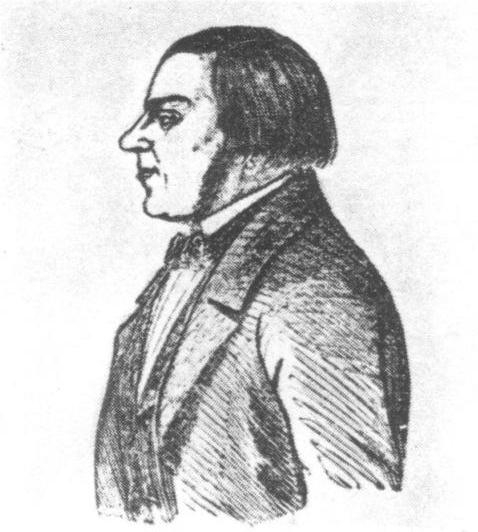 Portret Augusta Lindbergha (Månssona), rysunek z ok. 1850, autor nieznany